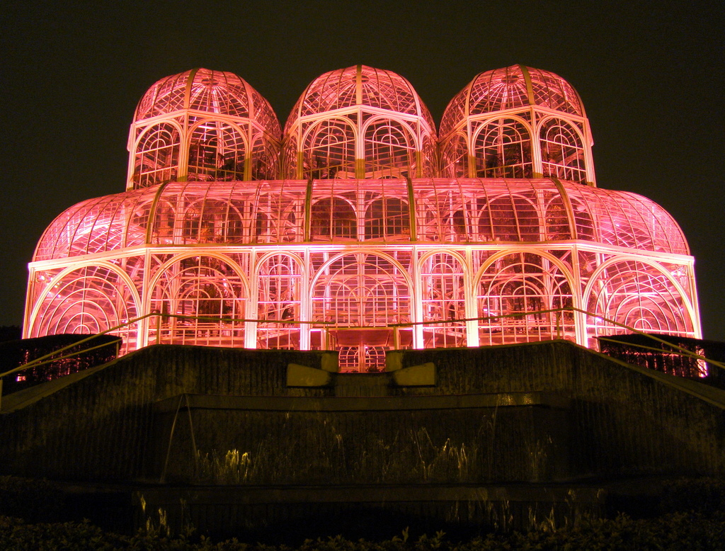 Iluminação rosa da estufa do Jardim Botânico de Curitiba (Curitiba, Paraná, sul do Brasil) para o Outubro Rosa, evento mundial para a conscientização da prevenção do câncer de mama.